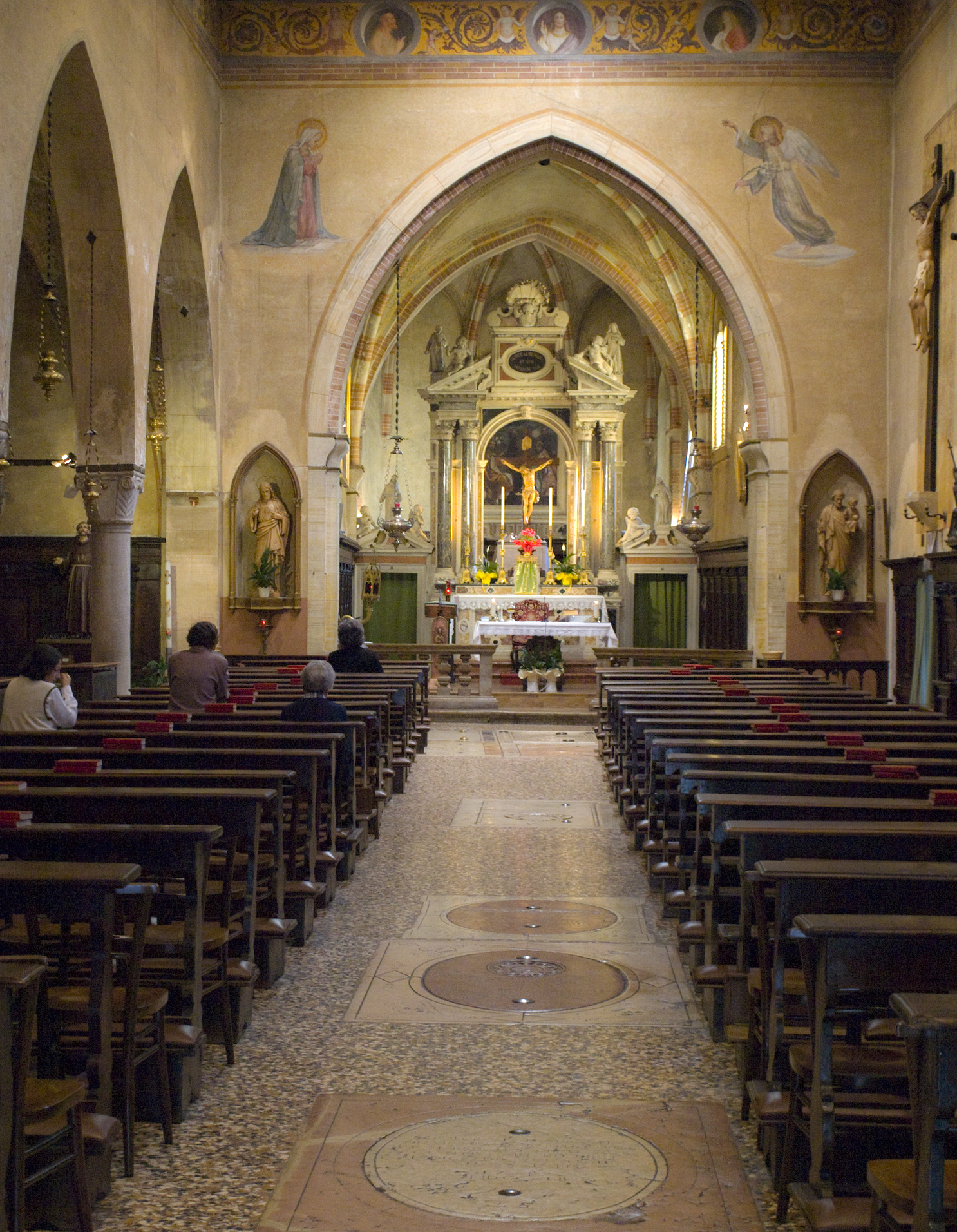 Chiesa di San Francesco This is a photo of a monument which is part of cultural heritage of Italy.